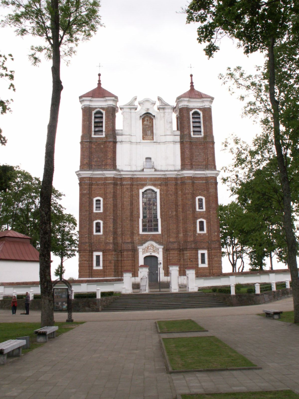 Kirche in Siluva